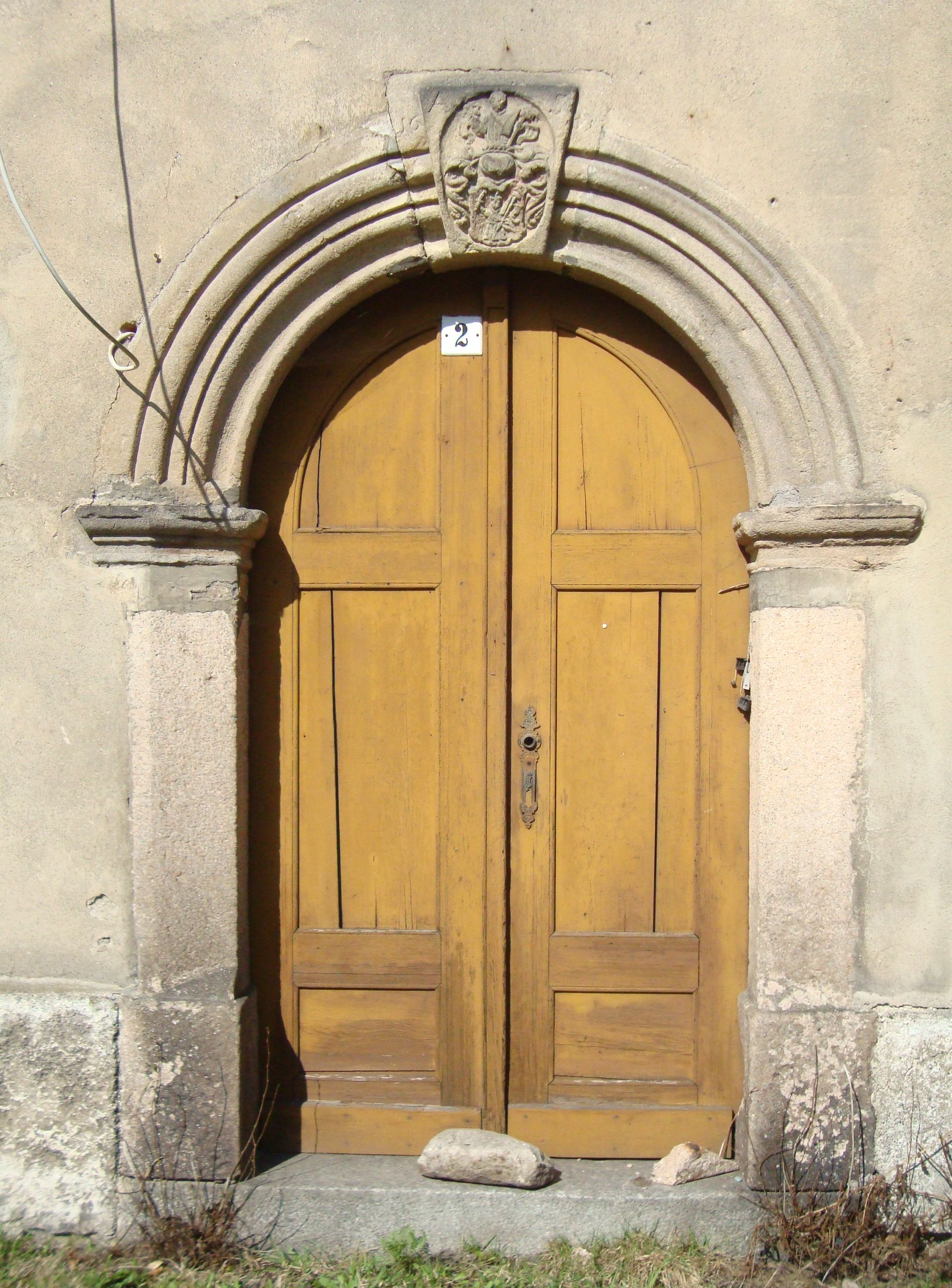 Portal am Hammerherrenhaus in Wolfsgrün im Erzgebirge